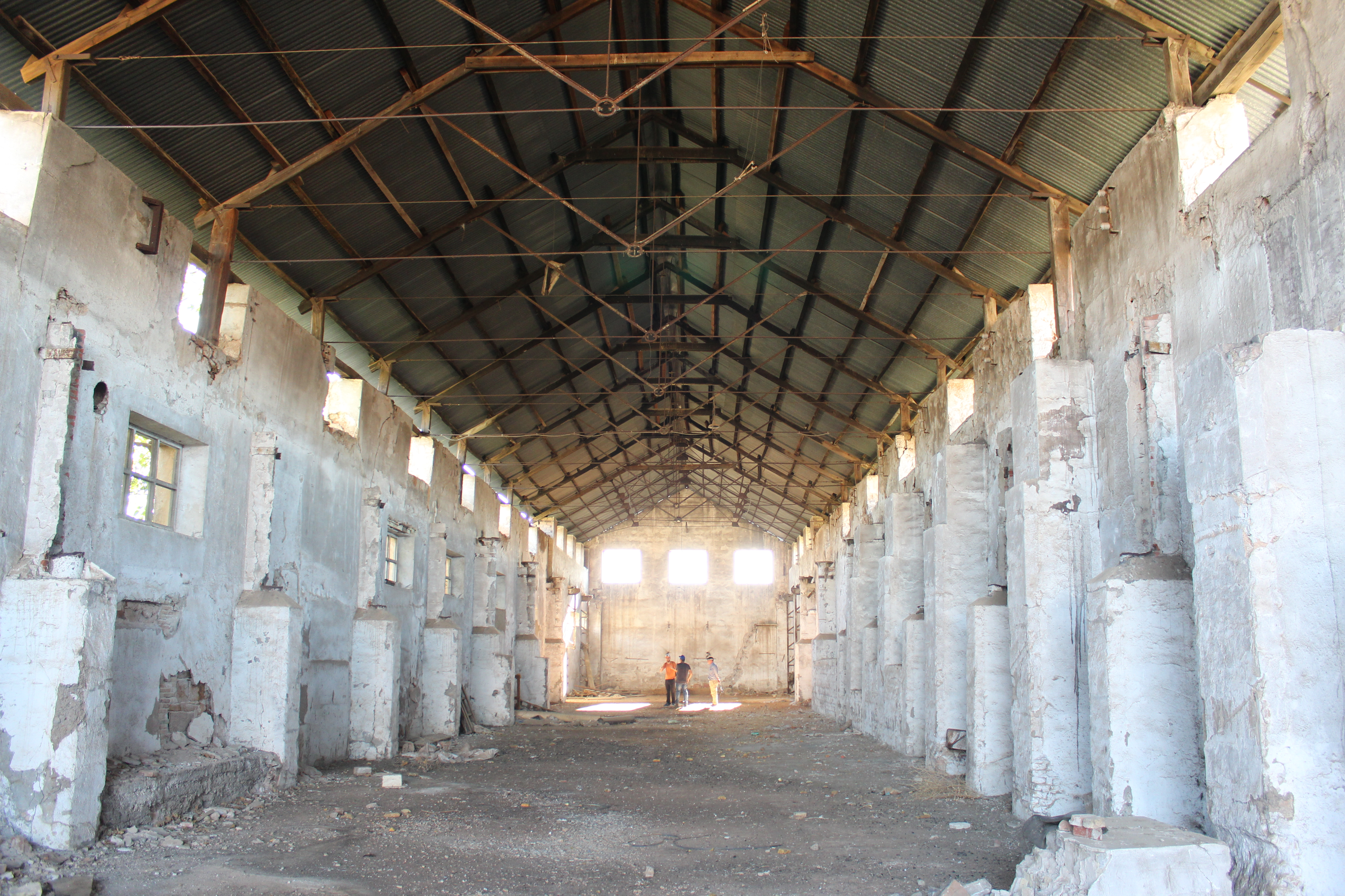 Nave donde se realizaba el desplate de la galena argentífera, en la Mina-Fundición La Tortilla.